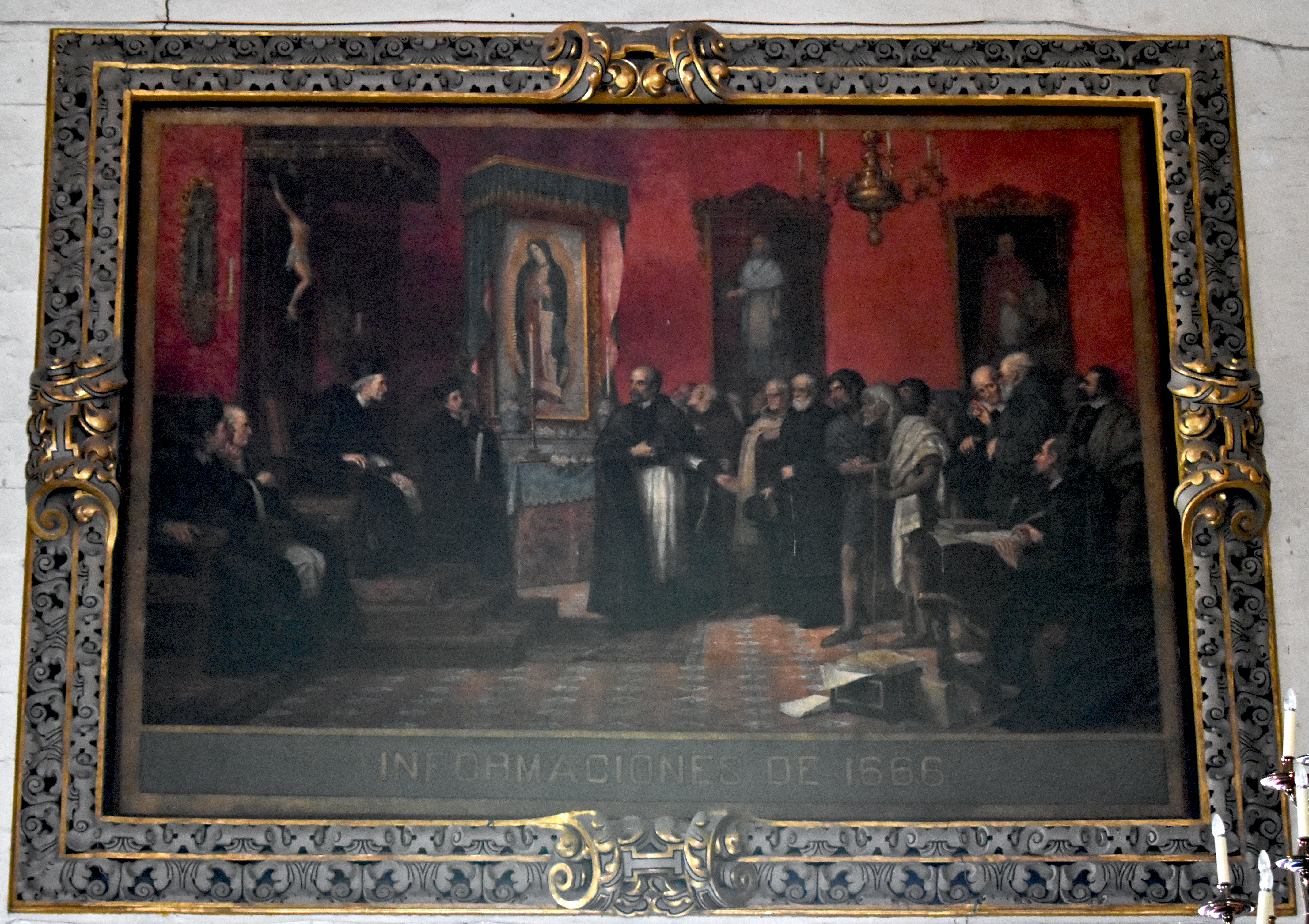 Pintura titulada "Informaciones de 1666". Autor José Ma. Ibarrán y Ponce, 1895. Óleo sobre tela, 6.00 x 4.50 m. Interior de la Antigua Basílica de Guadalupe. Conjunto Villa de Guadalupe